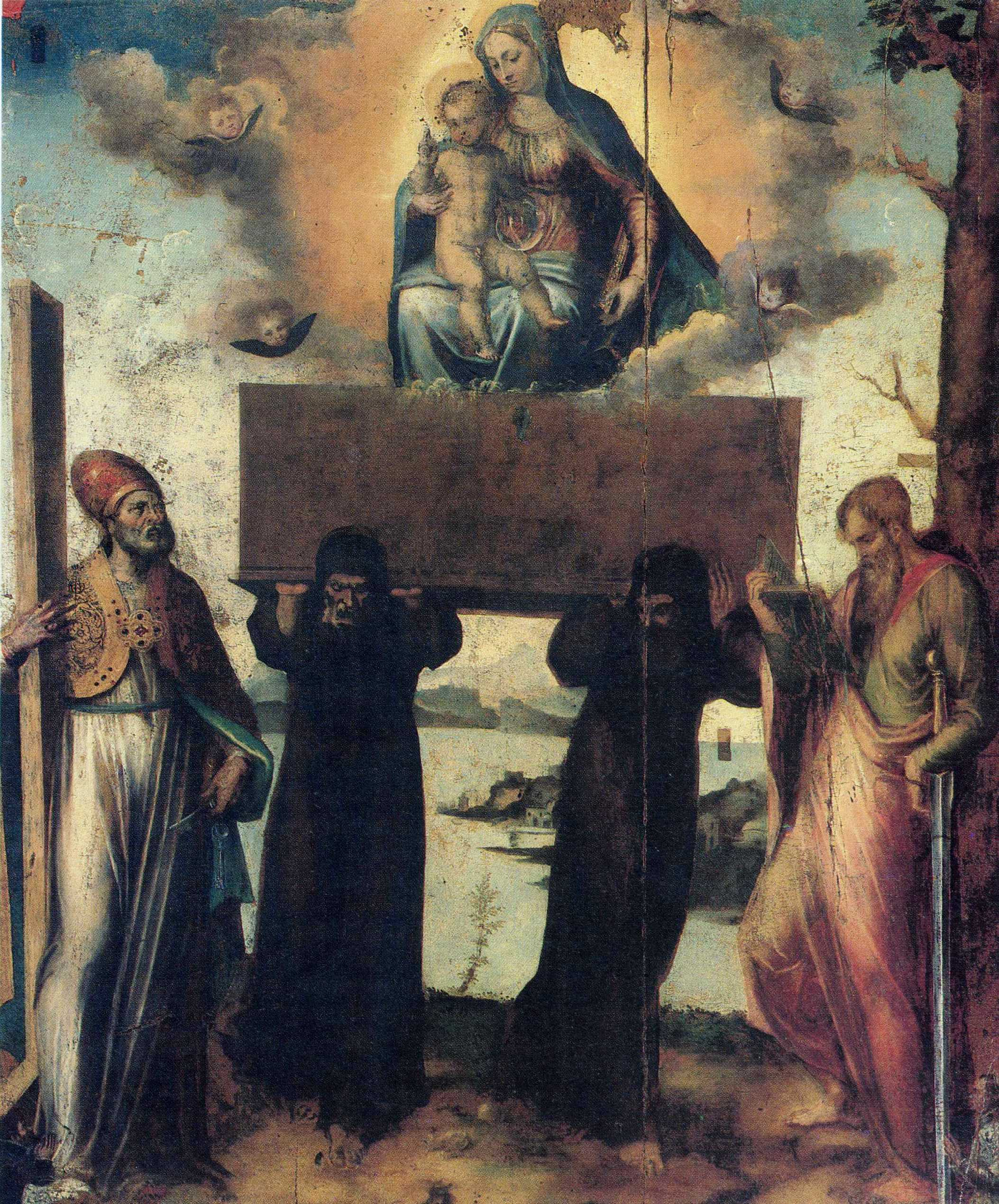 Gemälde der Madonna von Konstantinopel (abgekürzt: Itria) mit dem Kind auf dem Sarg, die aus dem einer Kiste aufsteigt und auf den Schultern von zwei betagten Calogeri getragen wird; links und rechts stehen Simon Petrus und Paulus von Tarsus